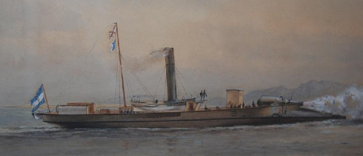 Cañonera bombardera Pilcomayo o Bermejo (gemelas)